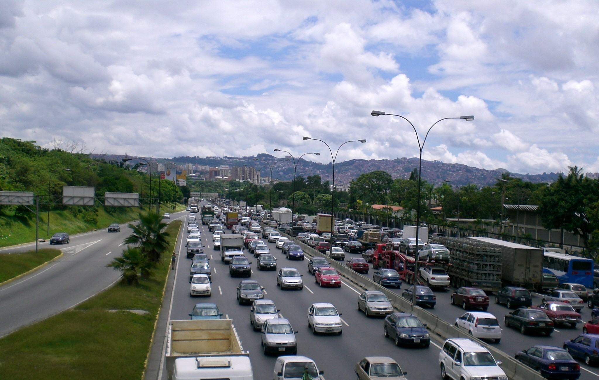 Francisco Fajardo Highway in Chacao Municipality, Caracas, Venezuela